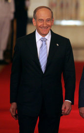 Afgeleid werk van :commons:Image:Ehud Olmert and George Bush 3.jpg